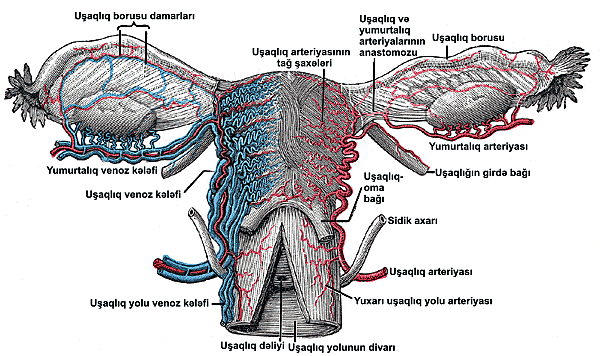 Uşaqlıq, yumurtalıq və uşaqlıq borularının qan təchizatı